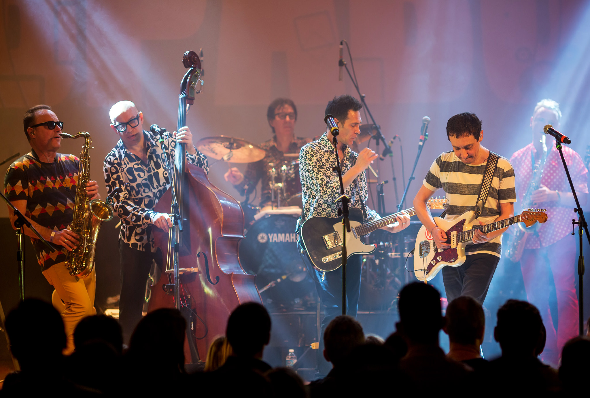 Рок-группа "Браво". Фото с концерта в Торонто (декабрь 2016).